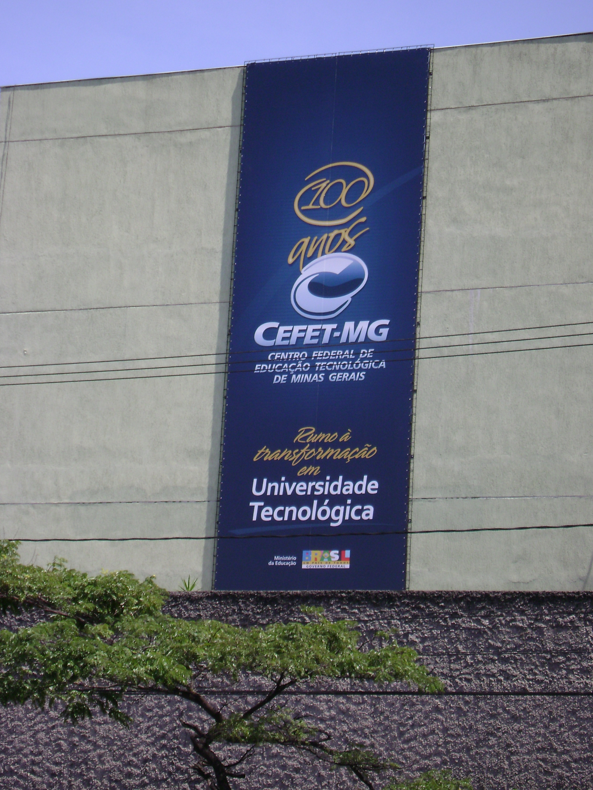 Banner (cartaz) afixado na fachada do prédio administrativo (campus I), indicando os 100 anos do Cefet-MG e divuldando a transformação do Centro em Universidade Tecnológica Federal (UTF), em Minas Gerais, Brasil.